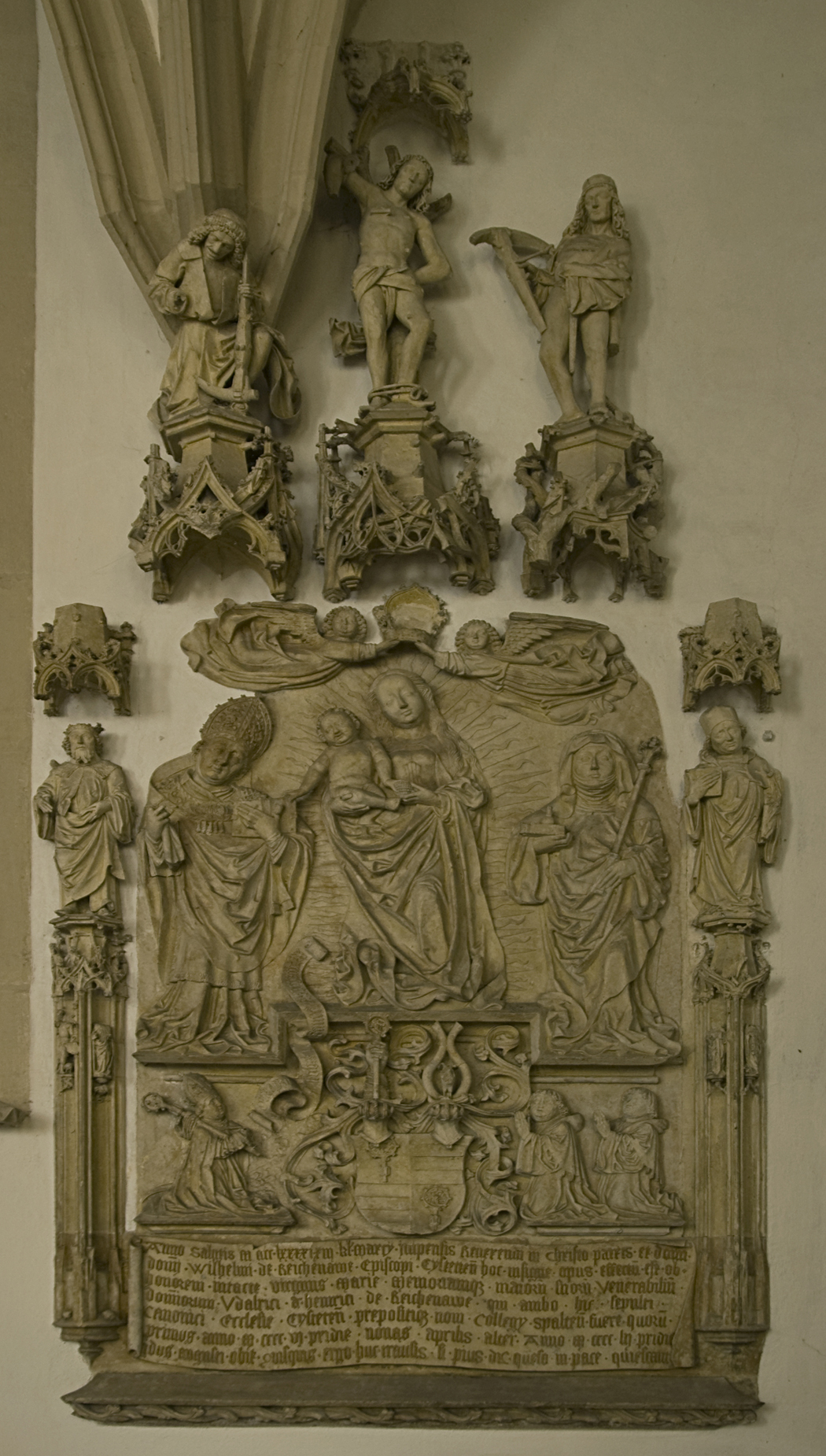 Reichenau-Denkmal an der Ostseite im Mortuarium des Dom zu Eichstätt. Von Wilhelm von Reichenau in Auftrag gegeben zu Ehren seiner Verwandten Ulrich und Heinrich von Reichenau.